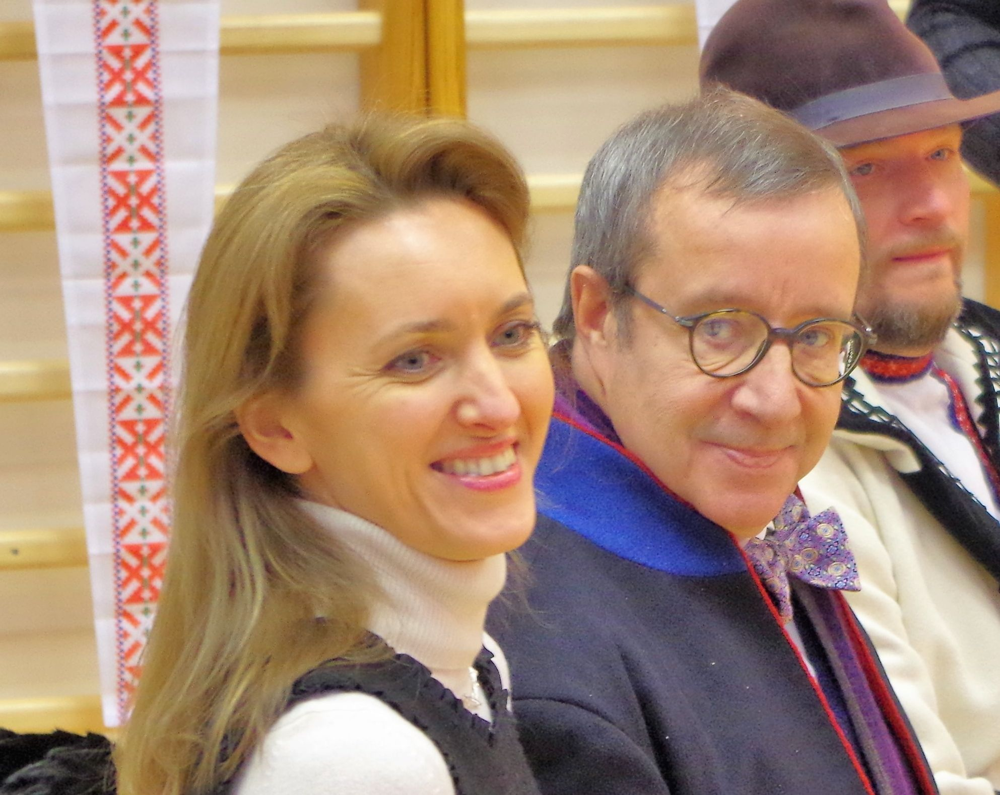 Ieva ja Toomas Hendrik Ilves Obinitsas